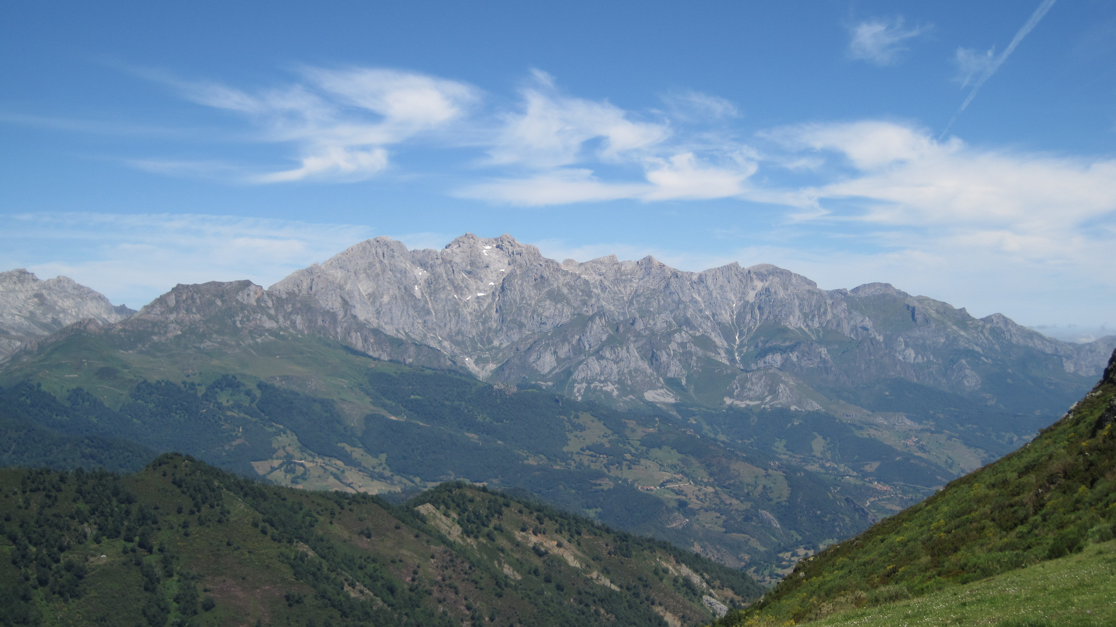 Vista del macizo de Ándara, en los Picos de Europa, desde el collado de Llesba, en el puerto de San Glorio (León-Cantabria, España).